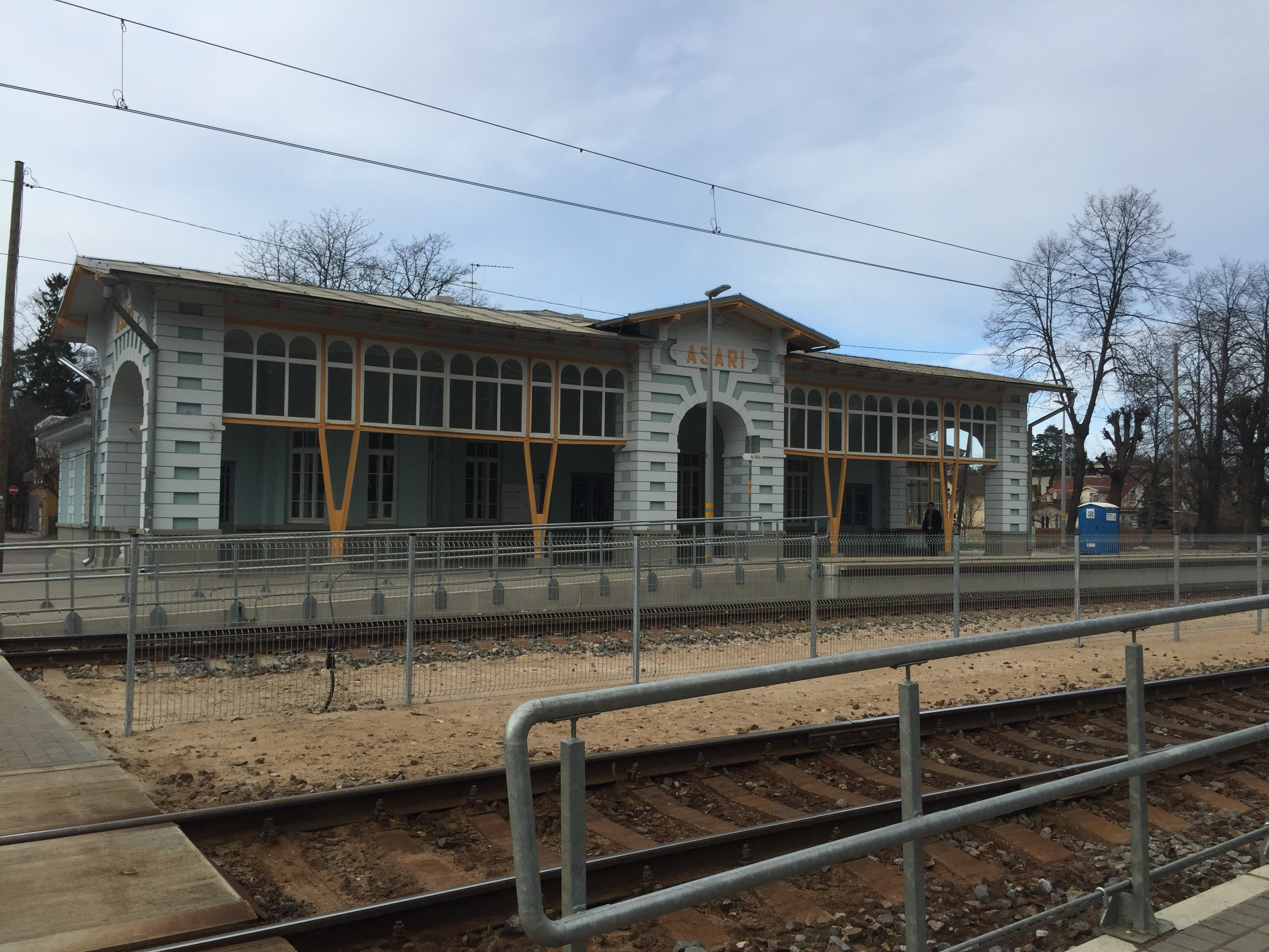 Asaru stacijas ēka